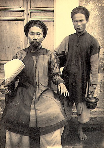 Một vị quan chức của thành phố Nam Định thời xưa. Ảnh chụp thời Pháp thuộc.